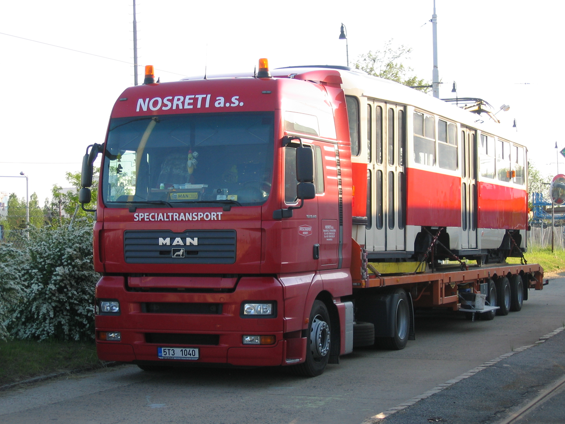 Fotka z přepravy tramvají pro DPP v Praze